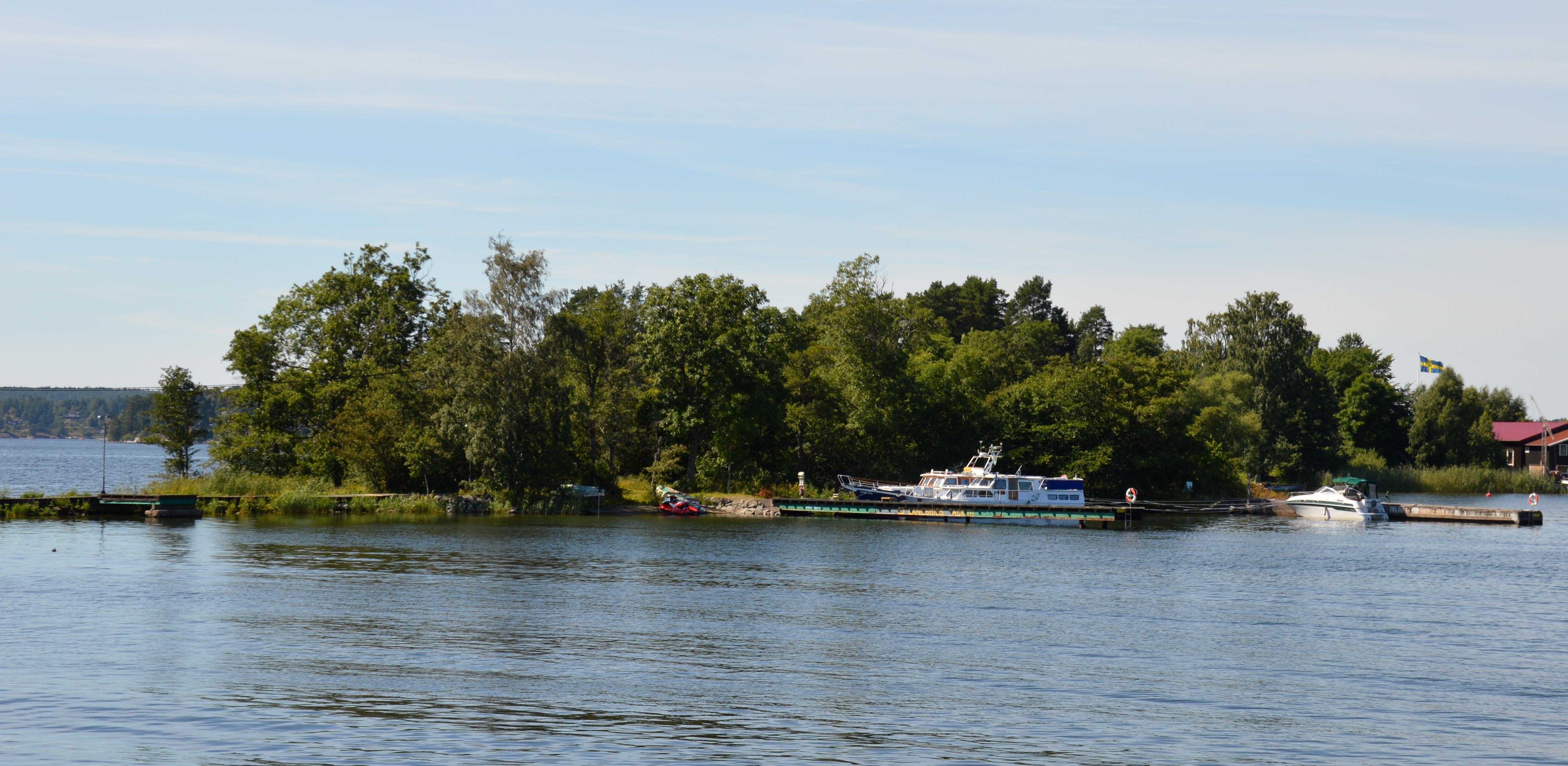 Lilla Getfoten